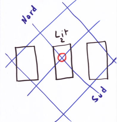 dessin à main levée du réseau de Hartmann